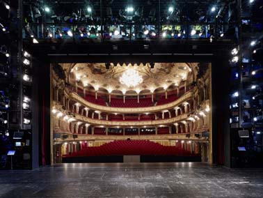 Blick in den Zuschauerraum des Opernhauses Zürich von der Bühne aus.